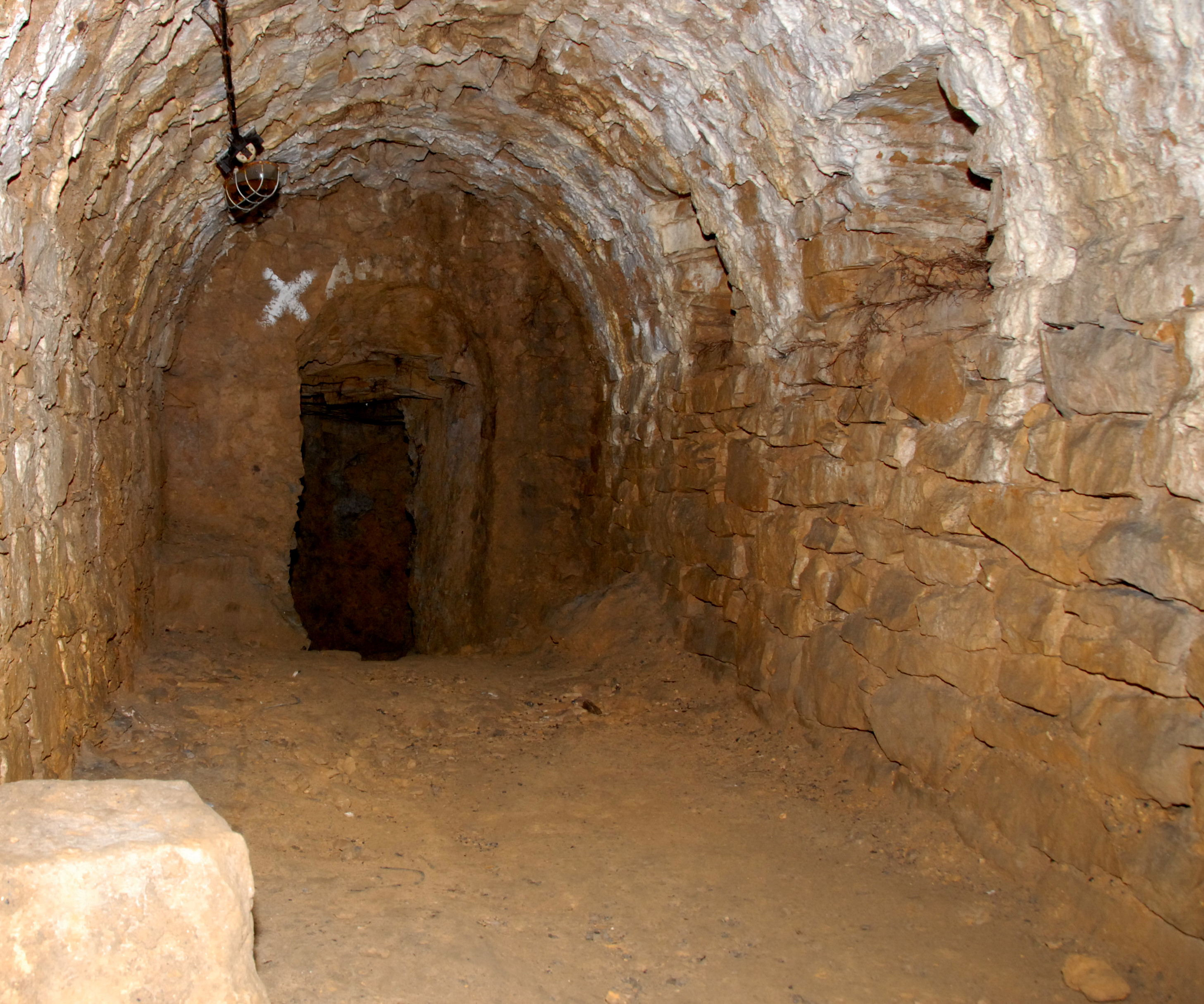 Kasematten vum Fort Lambert (Festung Lëtzebuerg).